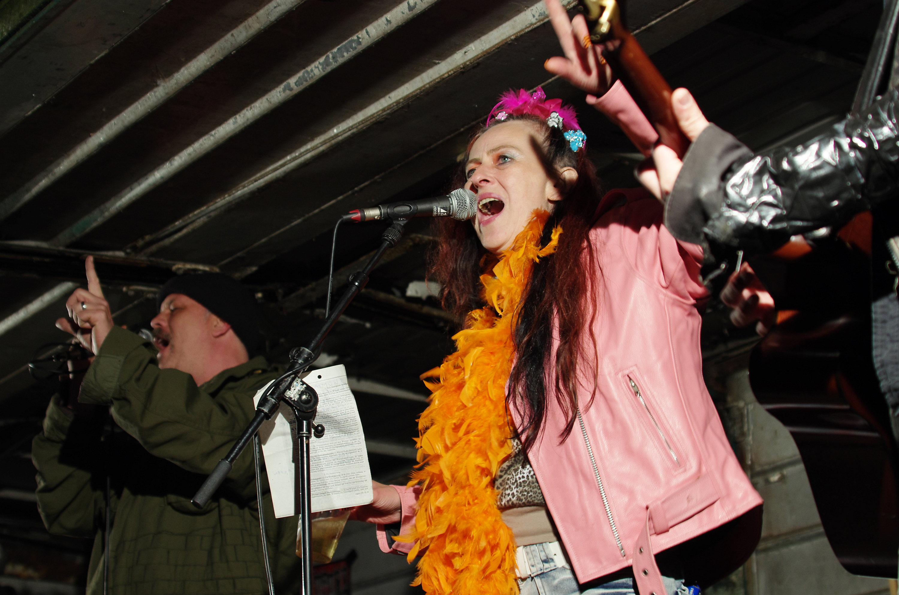 Eisenpimmel beim Ruhrpott Rodeo 2013 in Hünxe.